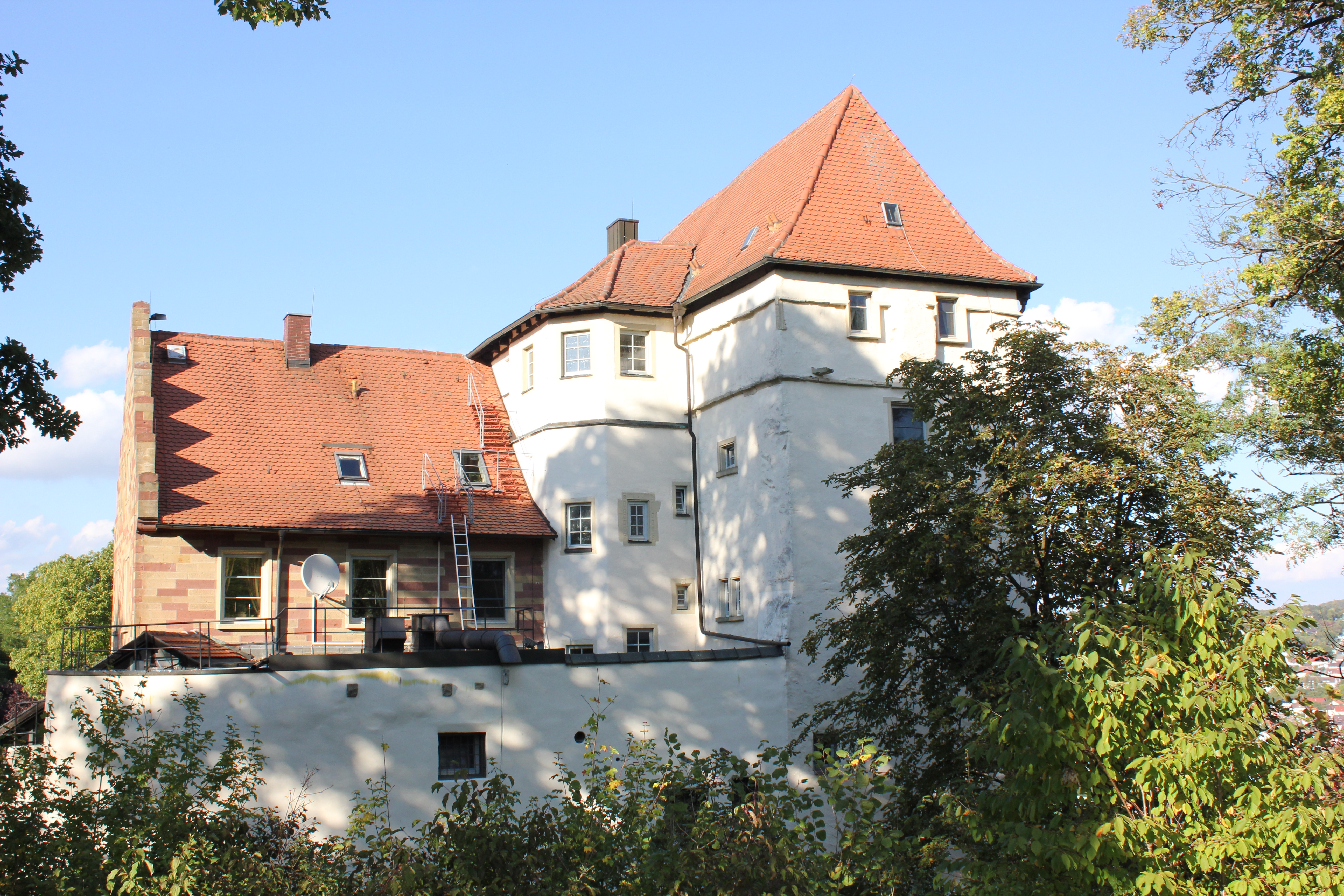 Seitliche Ansicht Schloss Neuburg bei Obrigheim